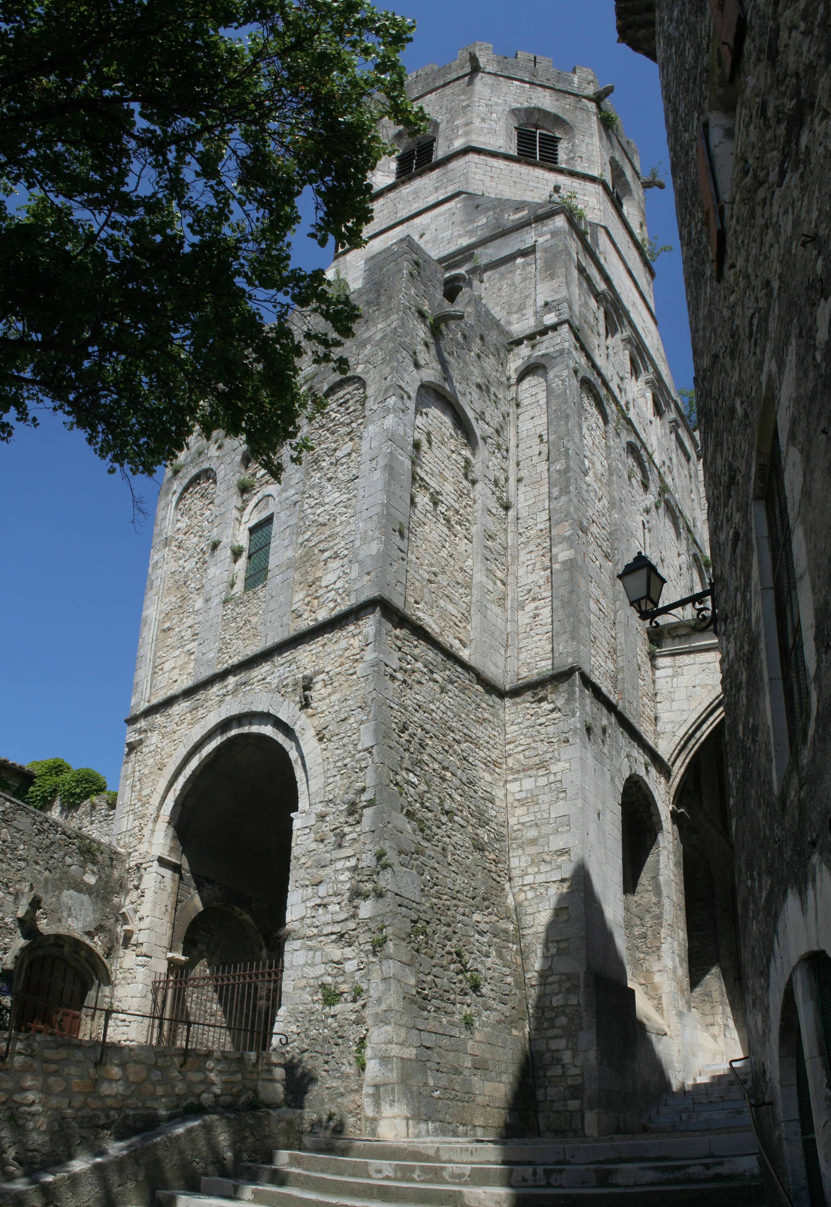 Clocher de la cathédrale de Viviers (Ardèche), classée monument historique. Montage de 4 photos avec Hugin, recadrage avec Gimp